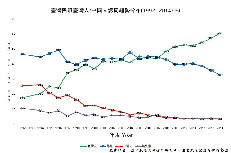 臺灣人認同趨勢分佈(1994年12月~2014年06月)